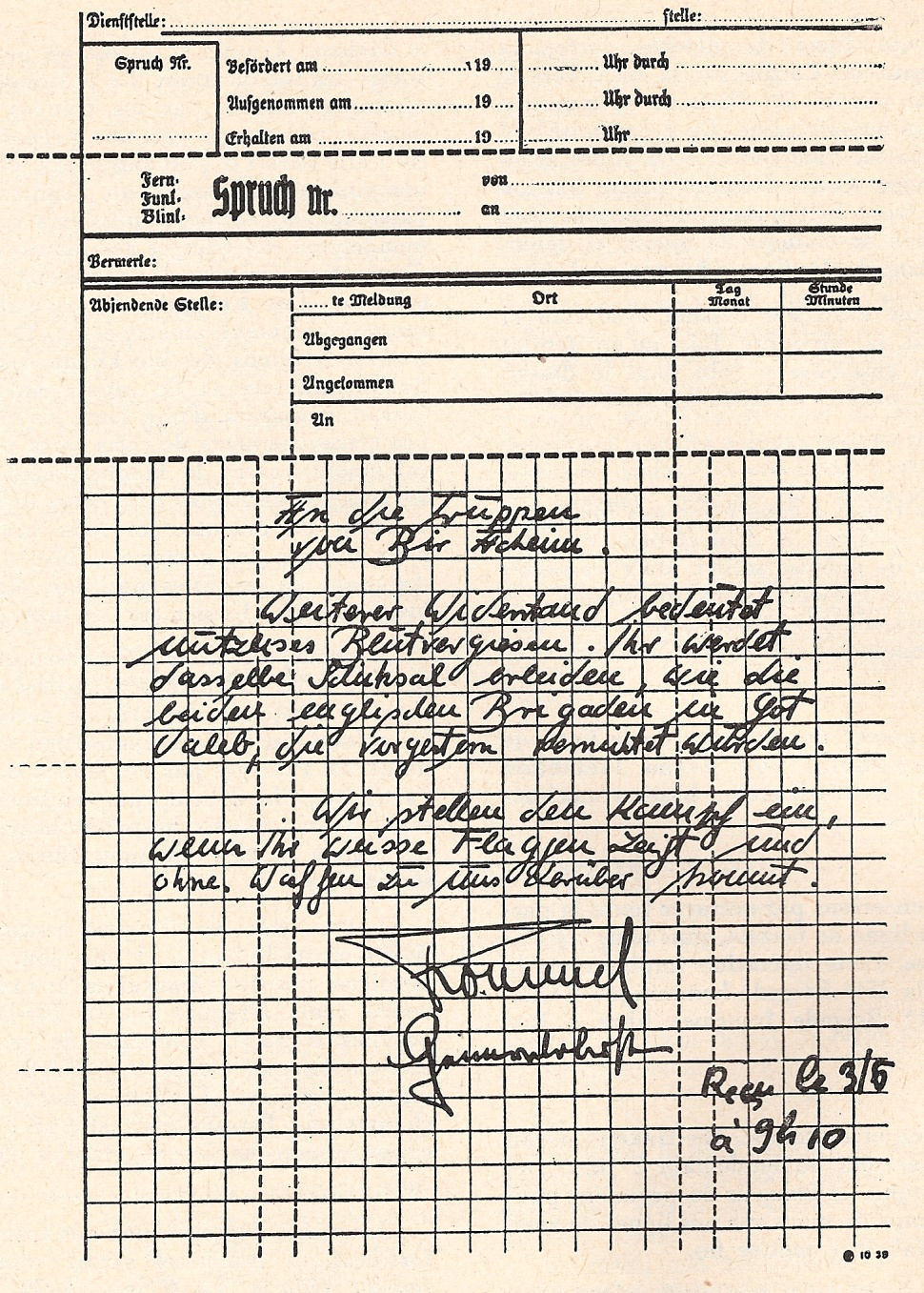 elaboration numerique de lettre dans le domaine public car écrite par auteur décedé depuis plus de soixantequinze ans